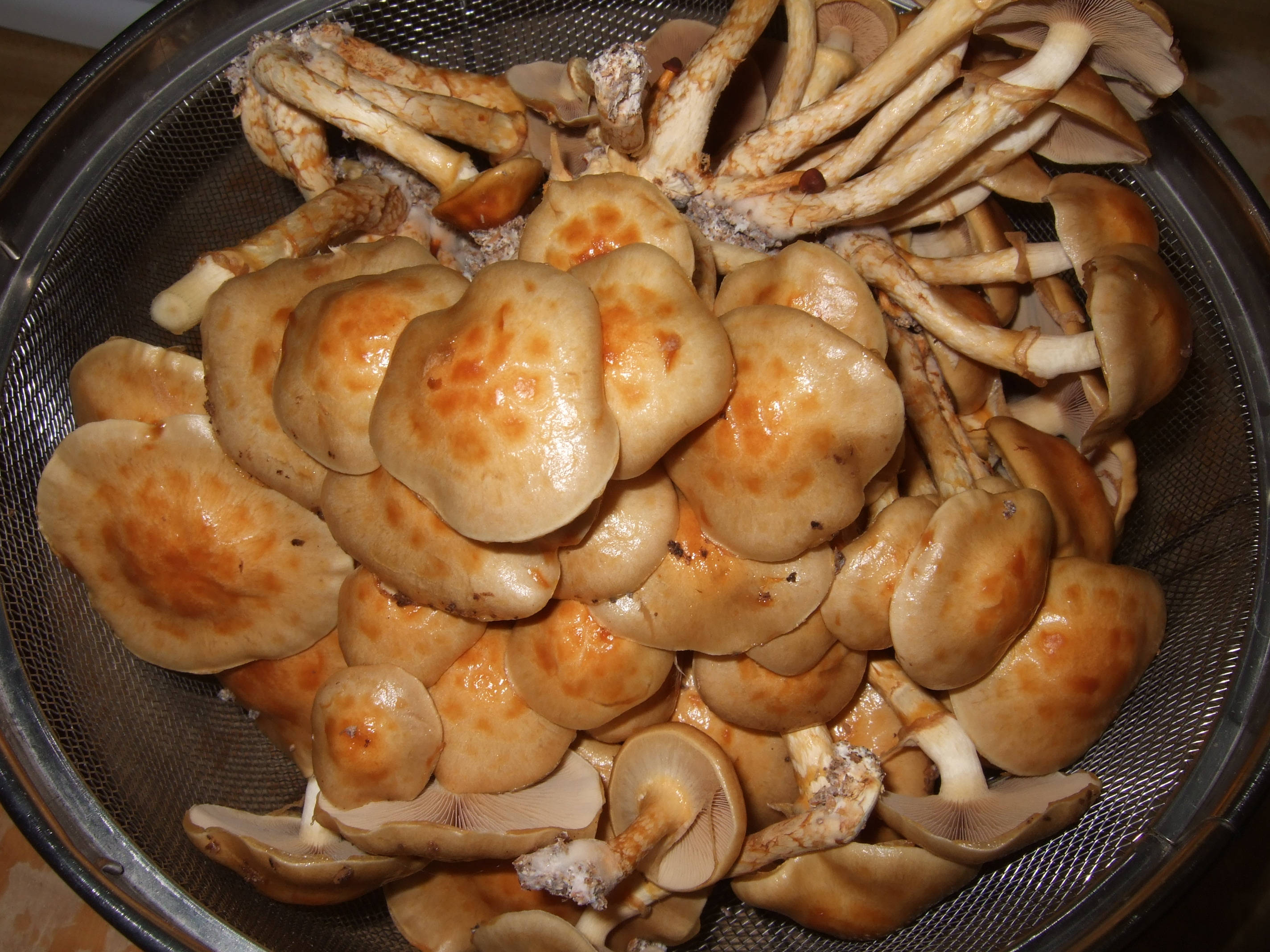 ナメコ